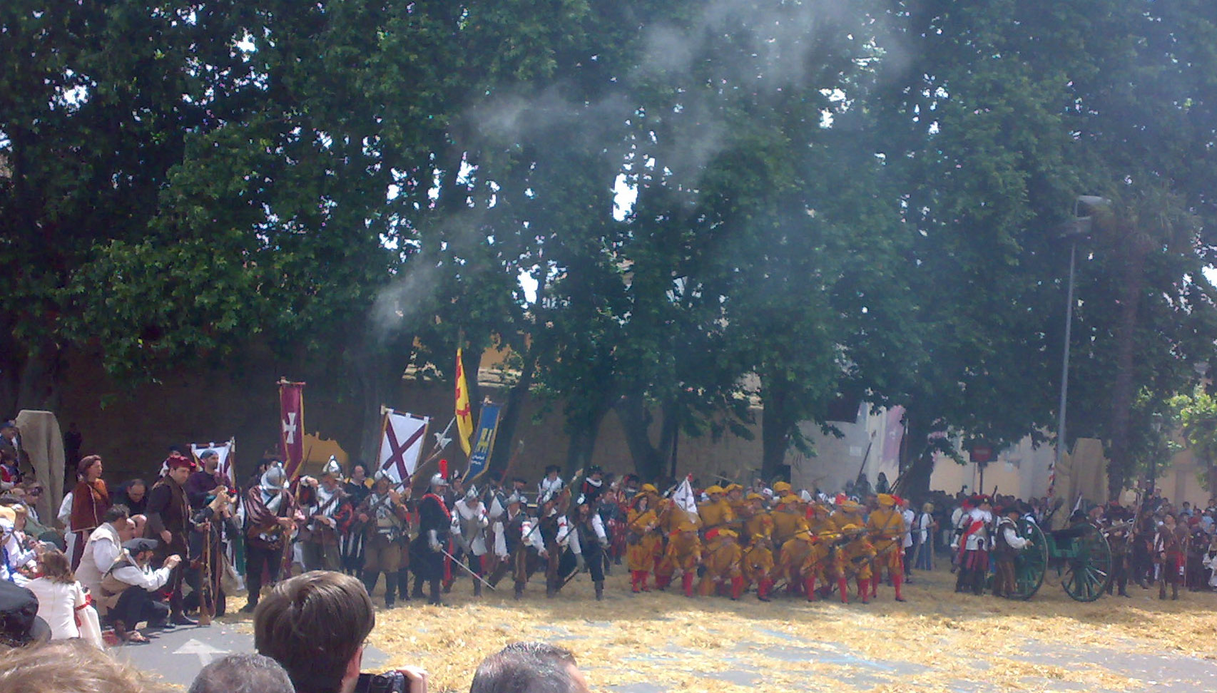 Representación del asedio de las tropas francesas a la ciudad de Logroño. Fiestas de San Bernabé.